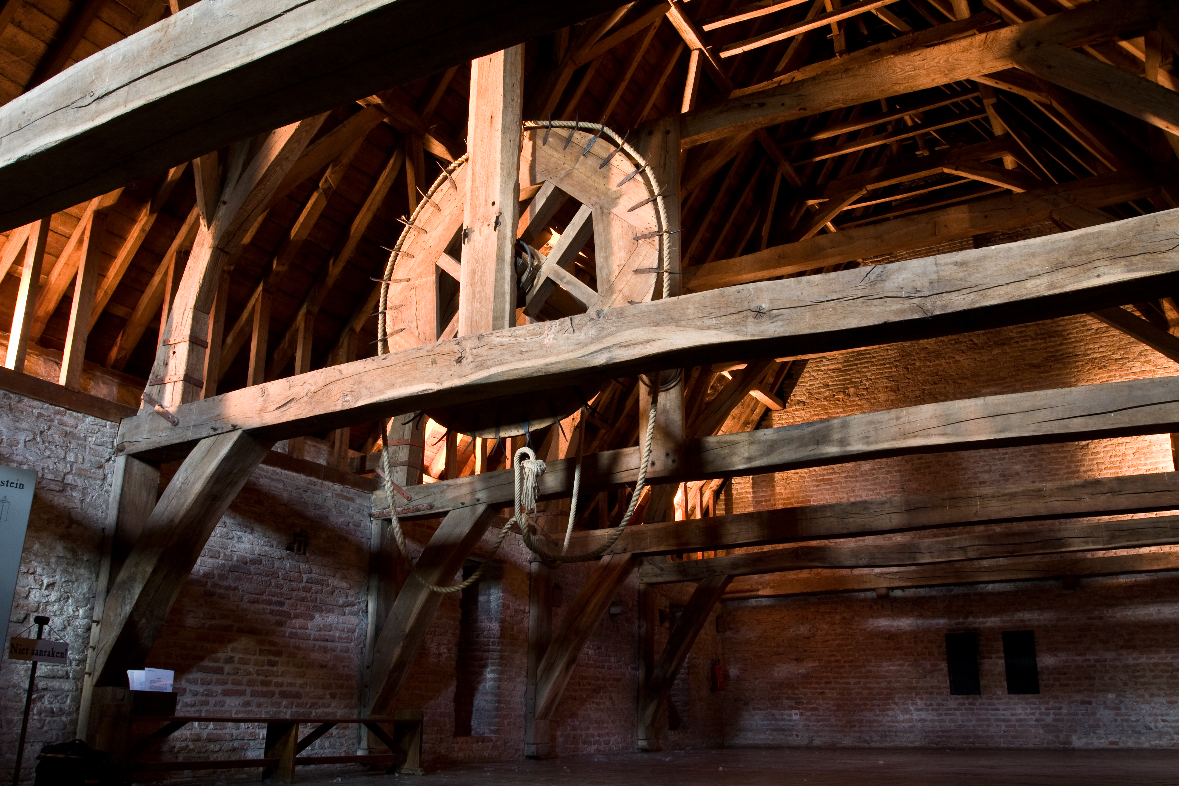 Slot Loevestein - Zolder met takelwiel